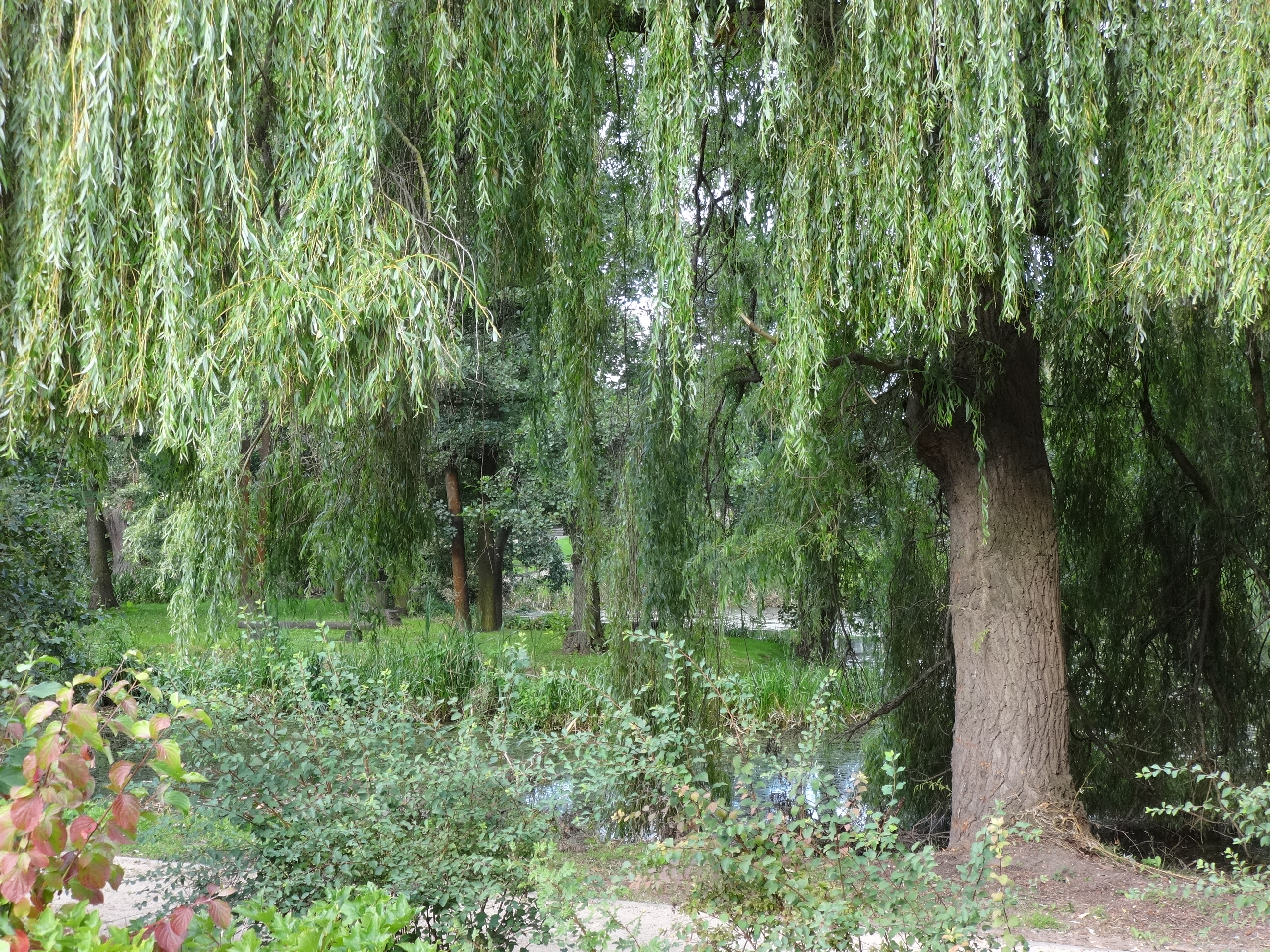 Bluthsluster Park in Anklam, eine denkmalgeschützte Parkanlage in Mecklenburg-Vorpommern